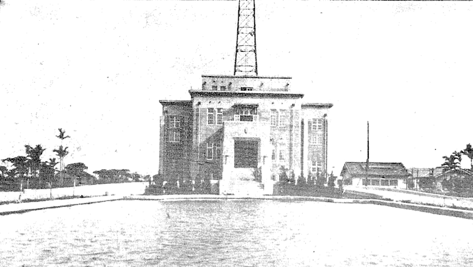 中文（台灣）: 台北無線電信局板橋無線送信所局舍